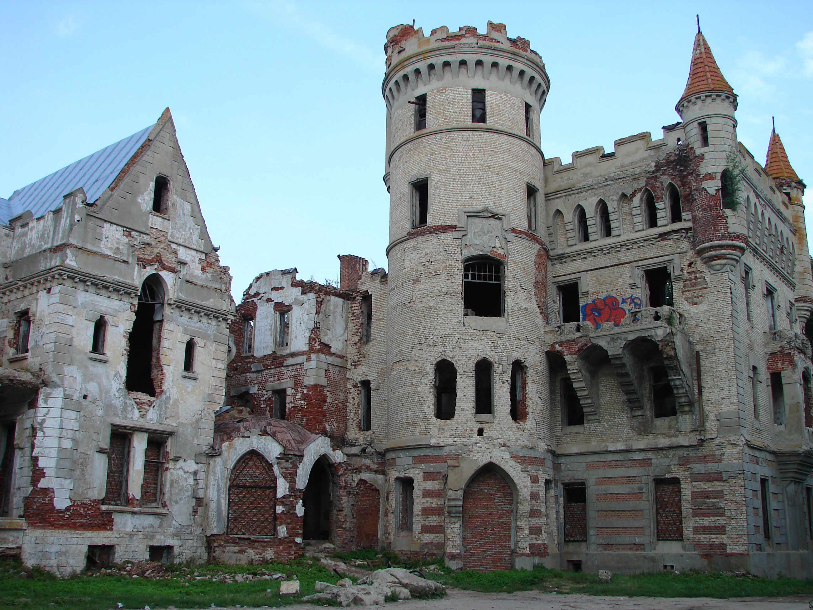 Усадьба Храповицкого «Муромцево» (Владимирская область, Судогда, посёлок Муромцево)